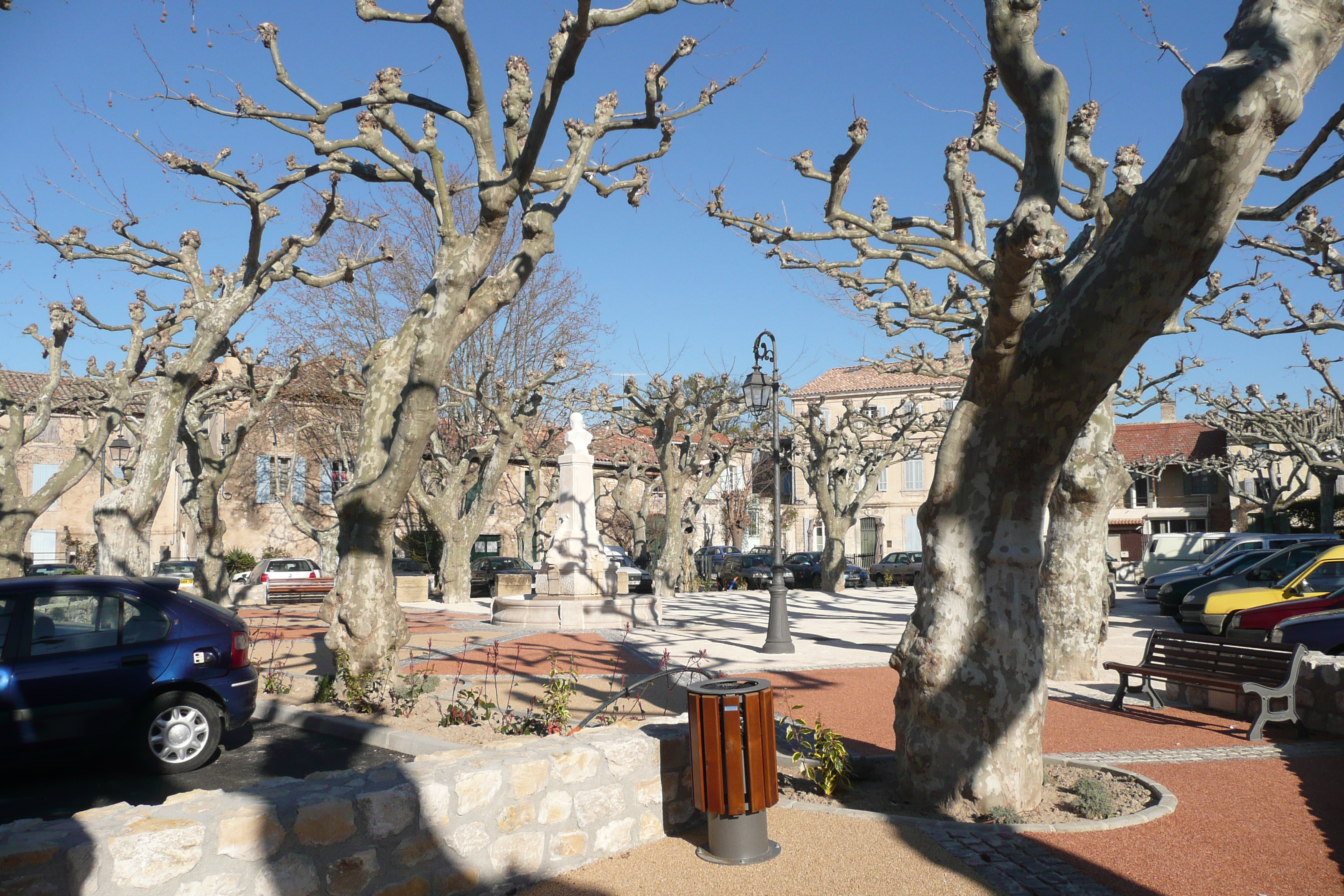 Place Noves.